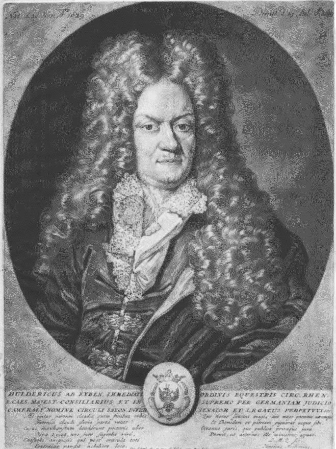 Portrait of Hulderich von Eyben (1629-1699), German jurist